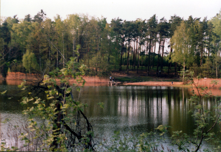 Widok na jezioro w Nowym Strączu (gmina Sława). Lata 90.